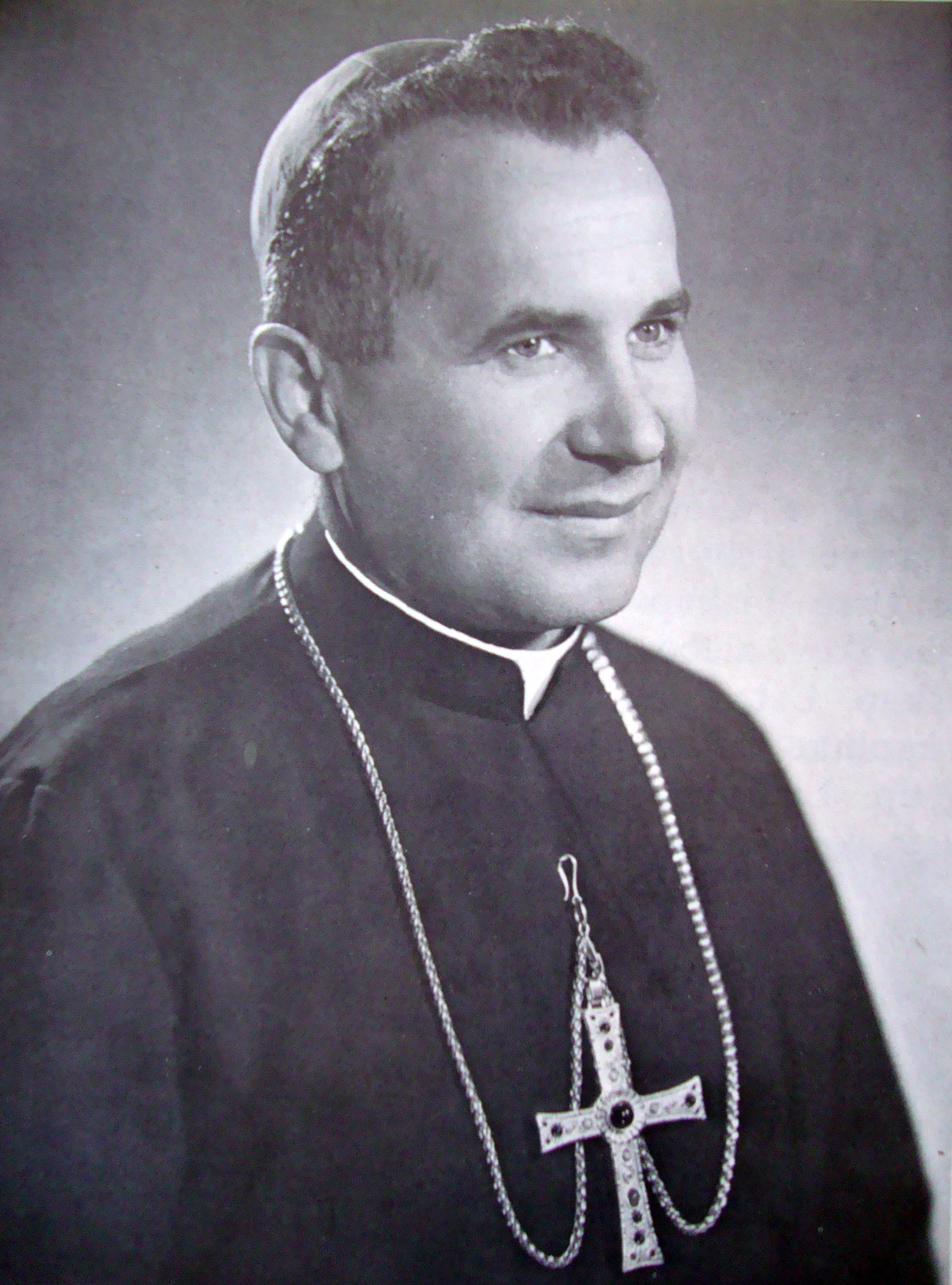 Vescovo mons. Pavol Hnilica